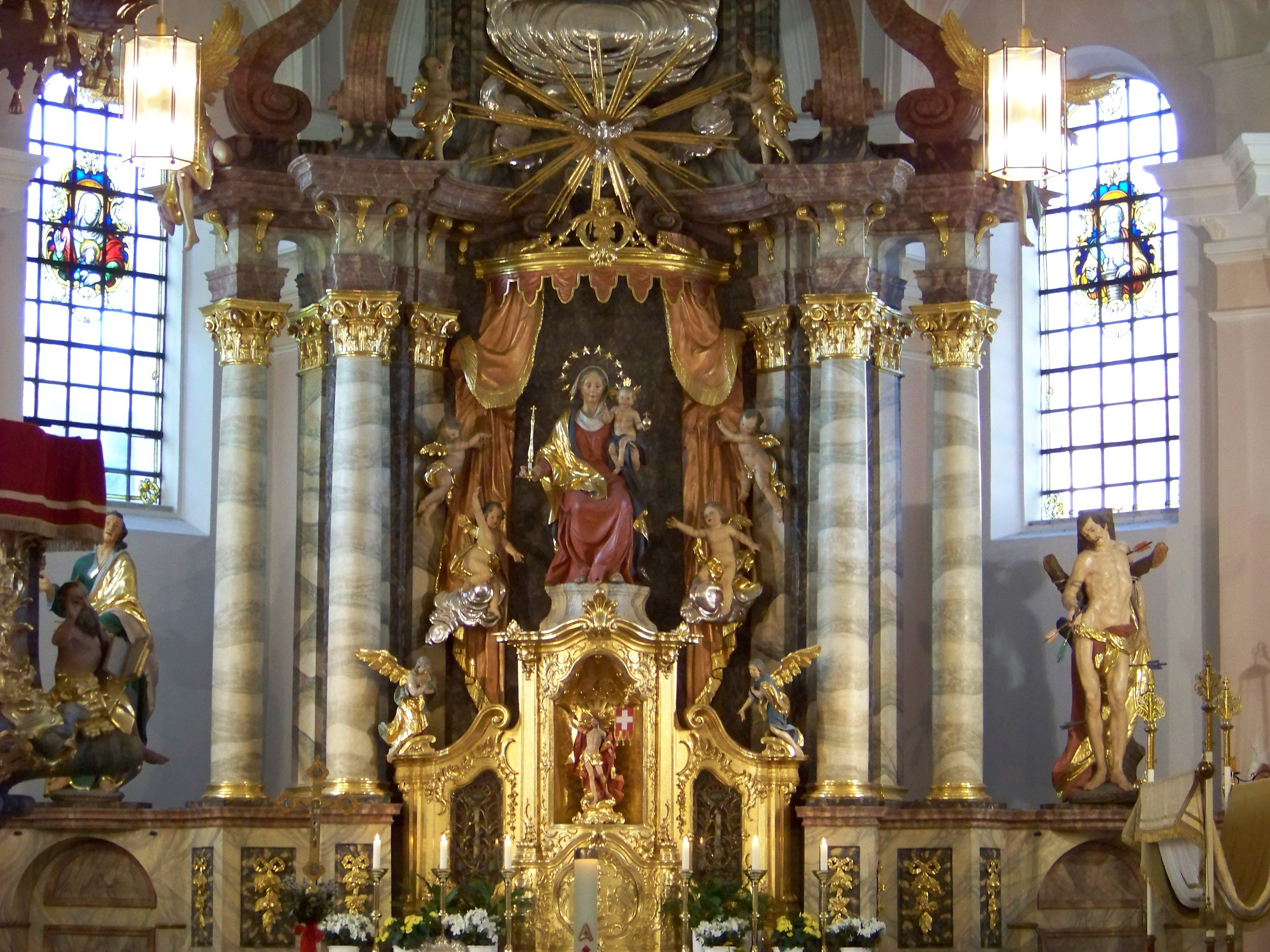 Mallersdorf-Pfaffenberg. Westen 82. Katholische Pfarrkirche Mariae Opferung. Hochaltar um die Mitte des 18. Jahrhunderts. Auf beiden Seiten kräftige, runde Säulen. Im Zentrum Marienfigur mit Jesuskind. Seitenfiguren Johannes der Täufer und St. Sebastian.